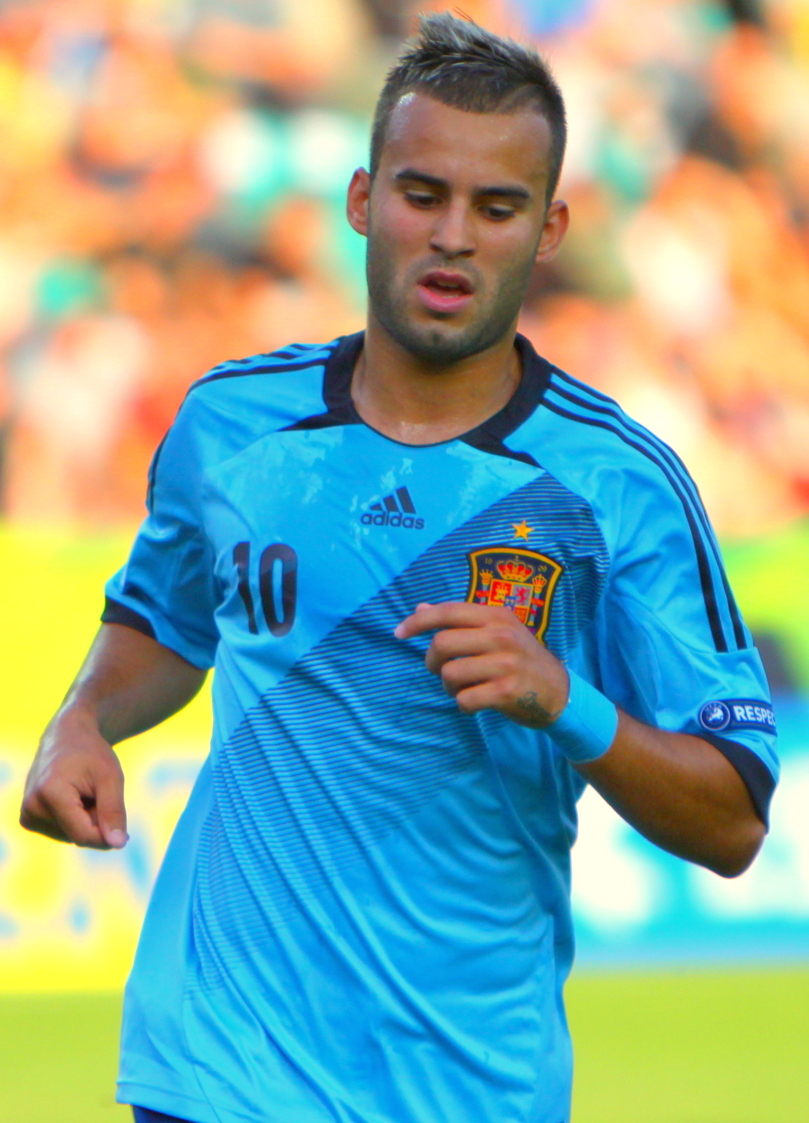 U-19 Portugal vs Spain.